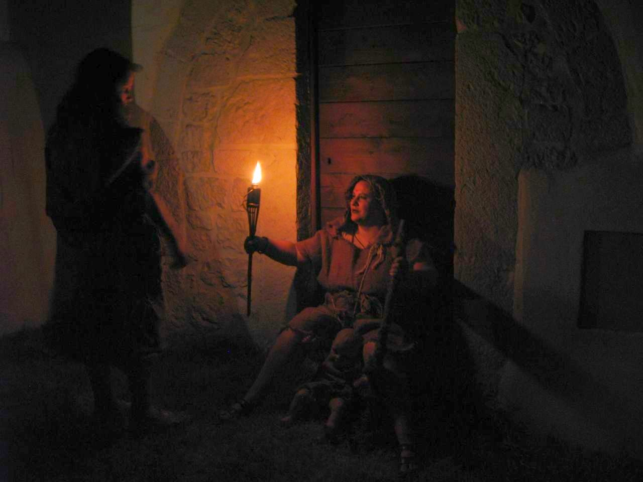 Rabska Fjera - Lepers (Gubavci) 2008